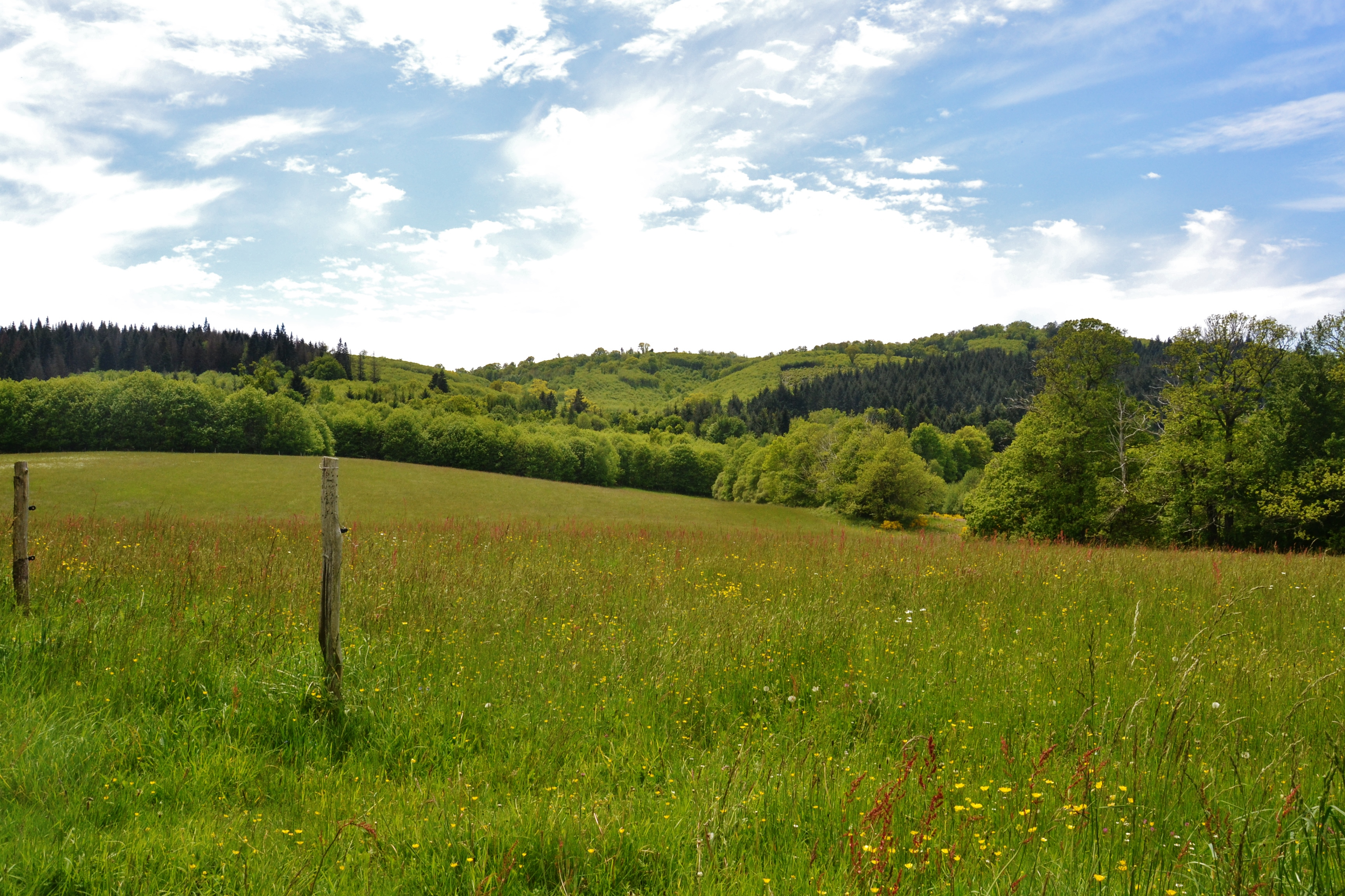 Les hauteurs de Courbefy, dans les monts de Châlus (Haute-Vienne, France)